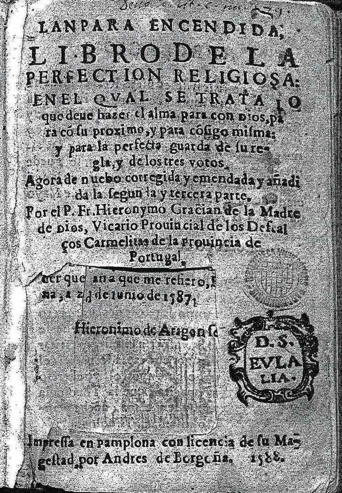 Portada de Lámpara Encendida, impresa por Andrés de Borgoña en 1588 en Pamplona, autor Jerónimo Gracián de la Madre de Dios